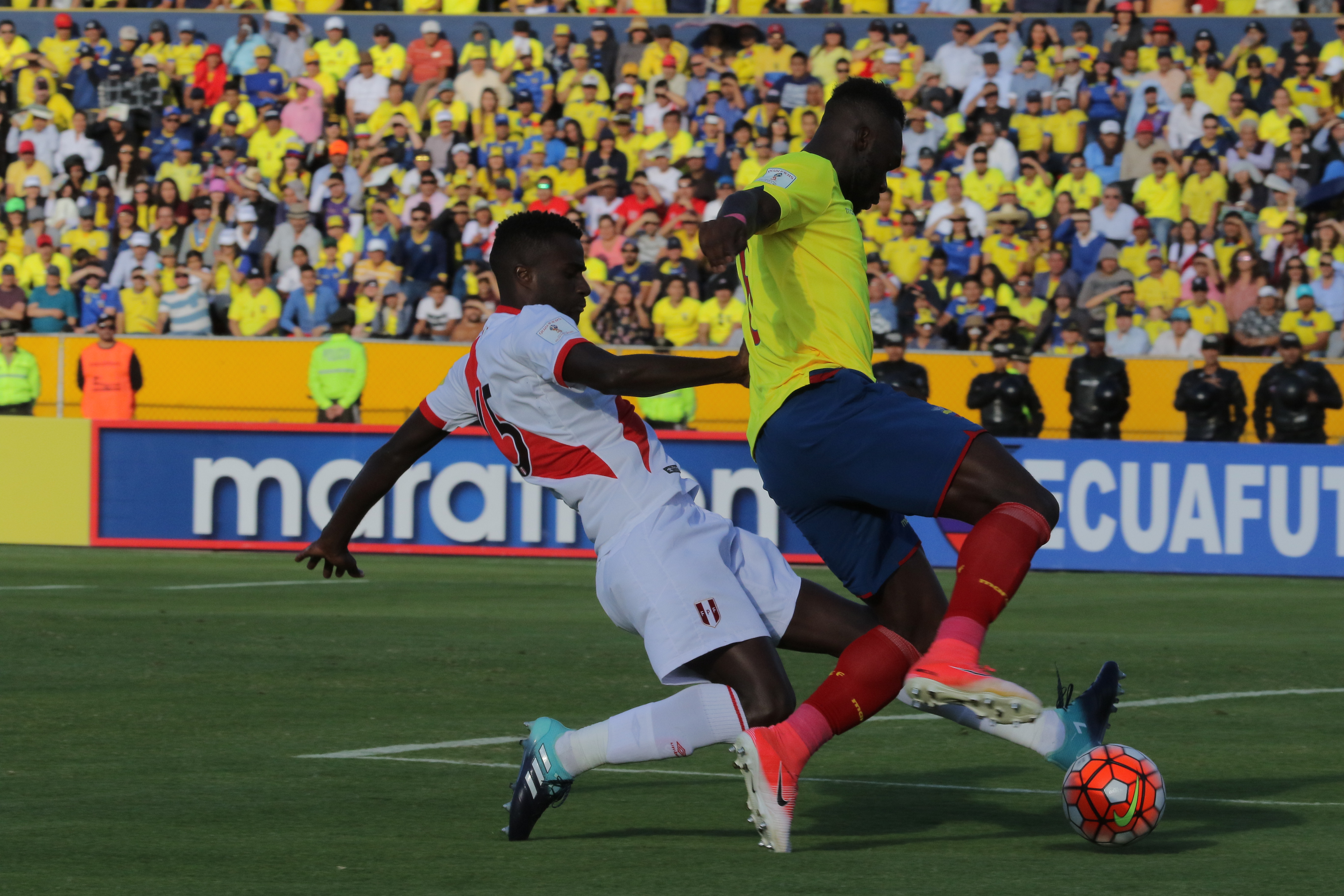 Quito 5 Sep (Andes).- Encuentro por eliminatorias Rusia 2018 entre Ecuador y Perú. Fotografías: Carlos Rodríguez/Andes.